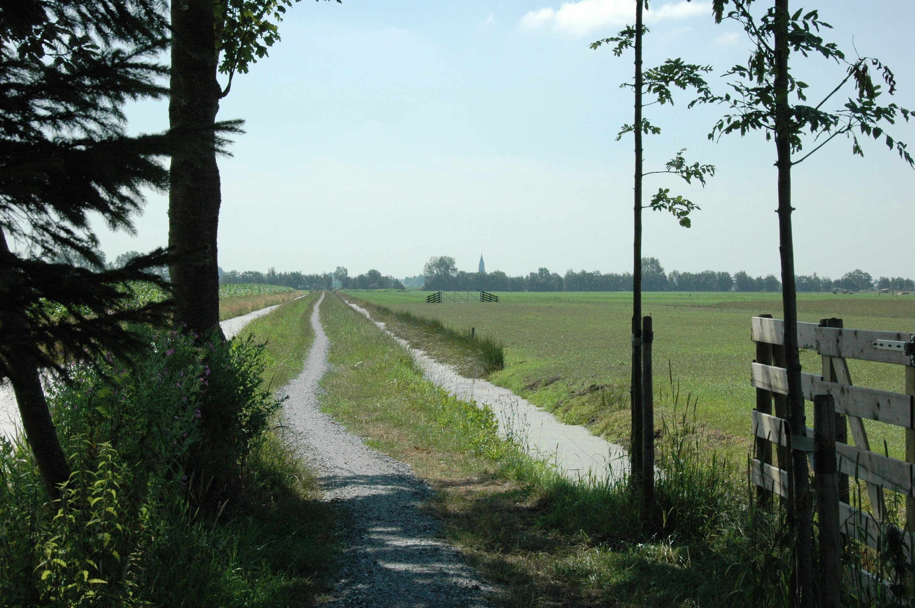 Kerkenpad, Polsbroekerdam